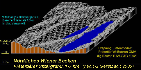 Wiener Becken, prätertiärer Untergrund